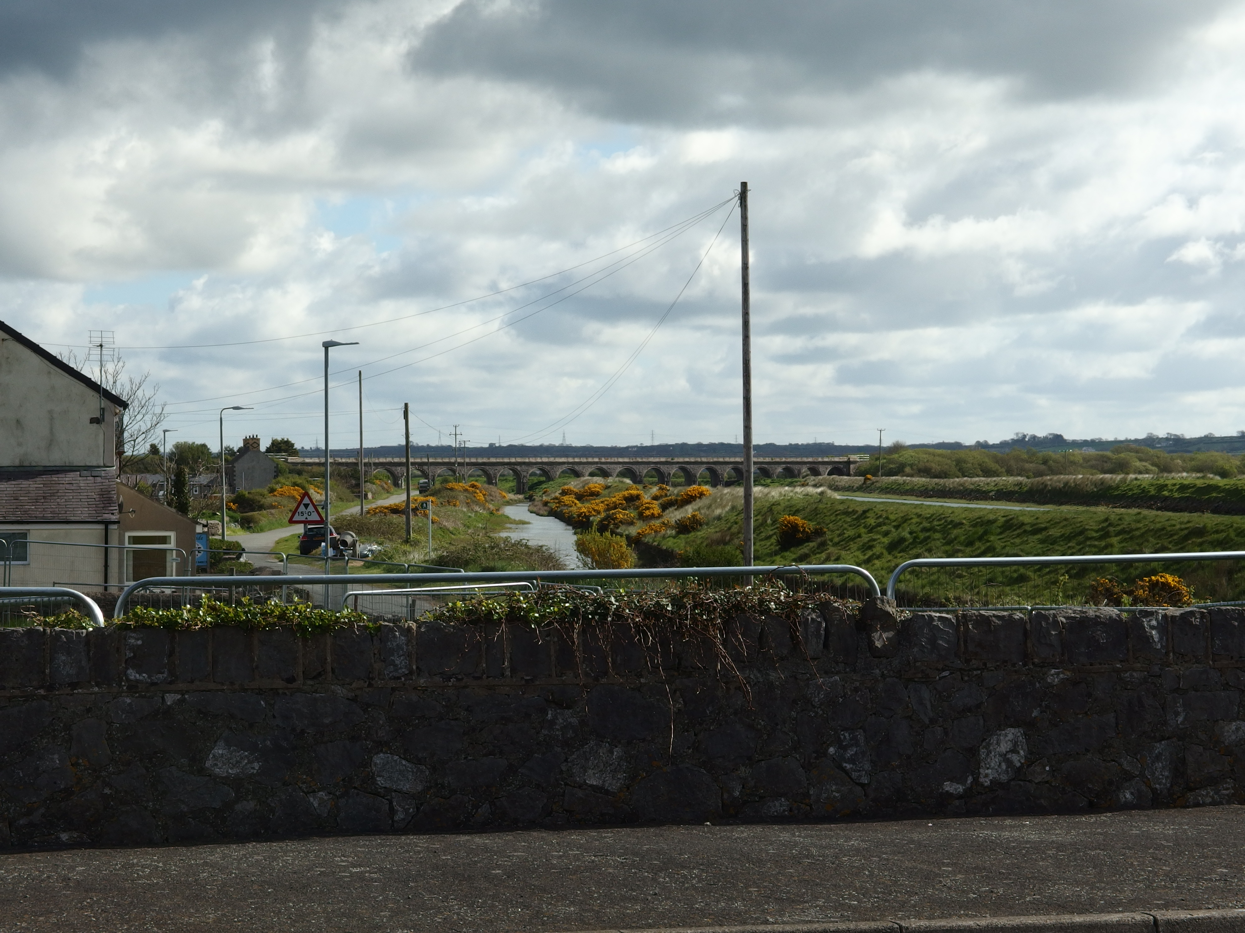 Cors Malltraeth